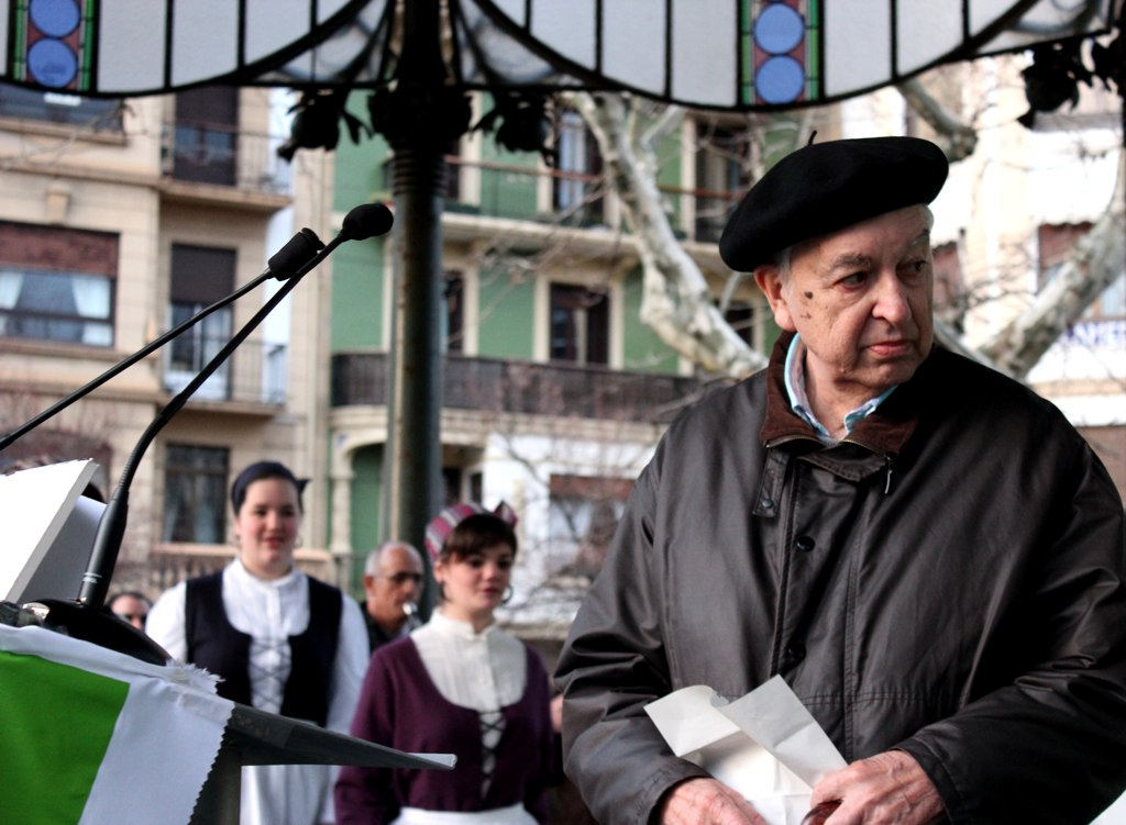 Txillardegi oholtzan, 2011n.